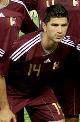 Vinotintos